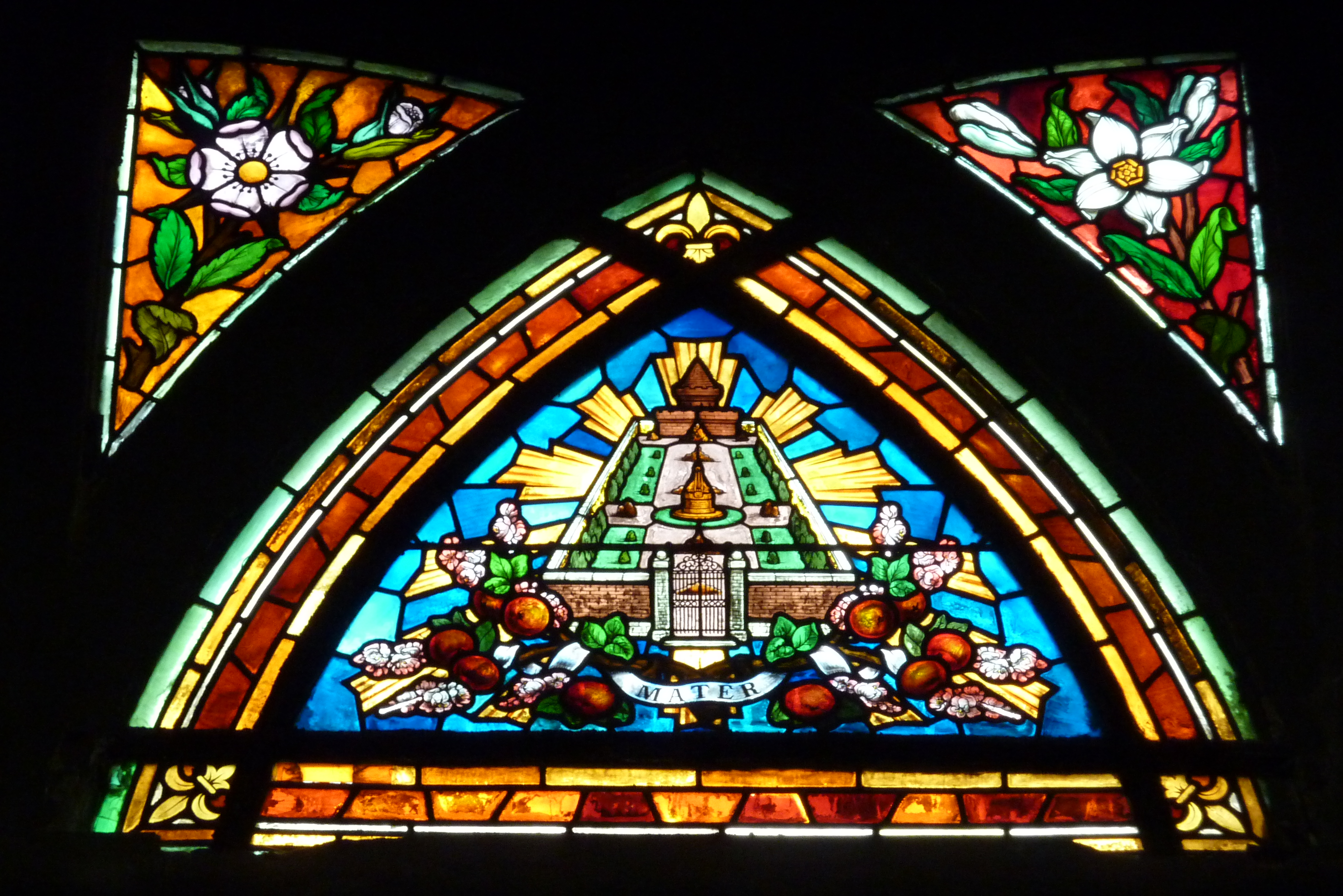 Bleiglasfenster im Seitenschiff der katholischen Pfarrkirche Saint-Jean-de-Montmartre in Paris, Darstellung: Hortus conclusus/Lauretanische Litanei, Entwurf: Pascal Blanchard, Ausführung: Jac Galland